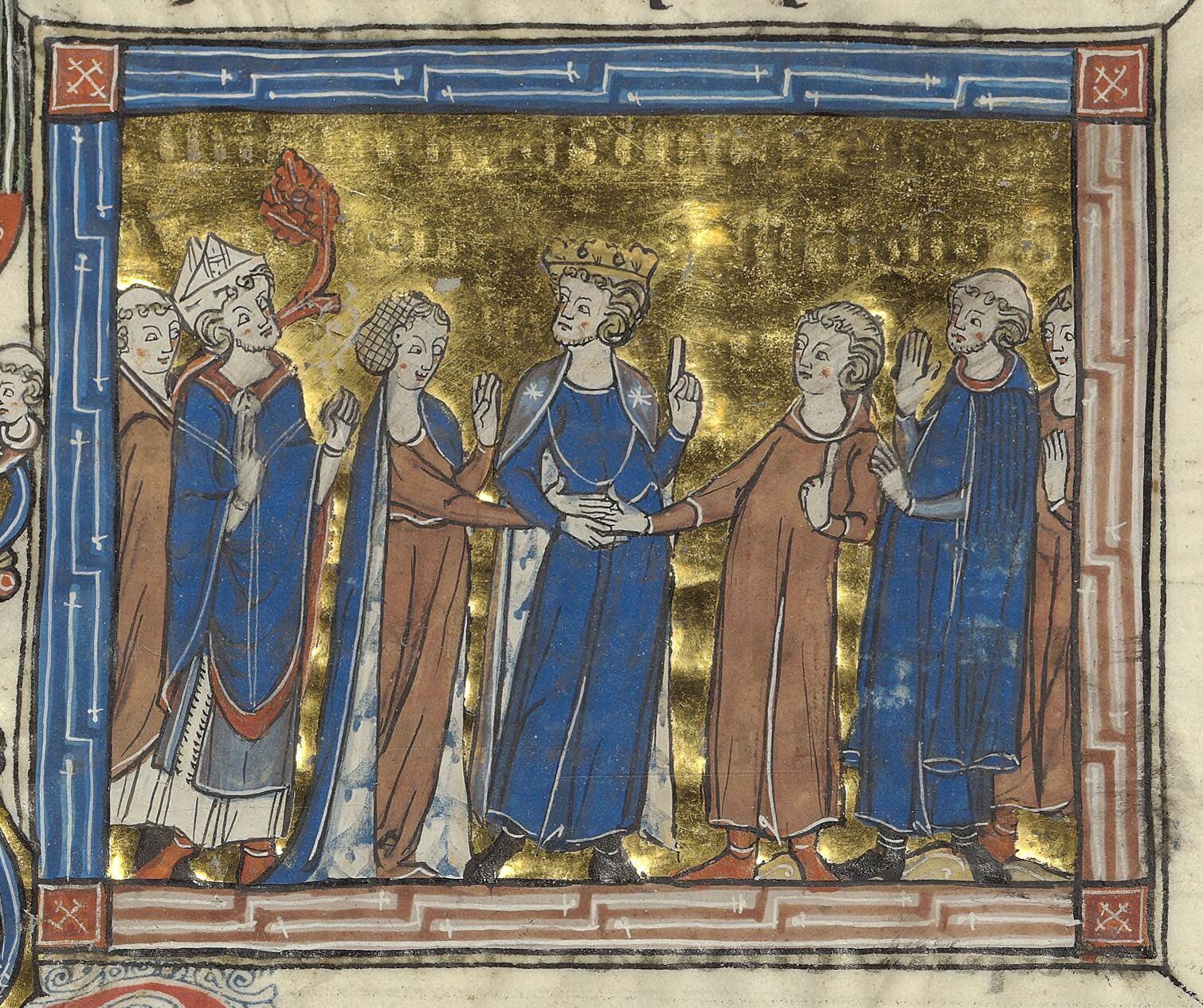 Mariage de Gui de Lusignan et de la sibylle de Jérusalem